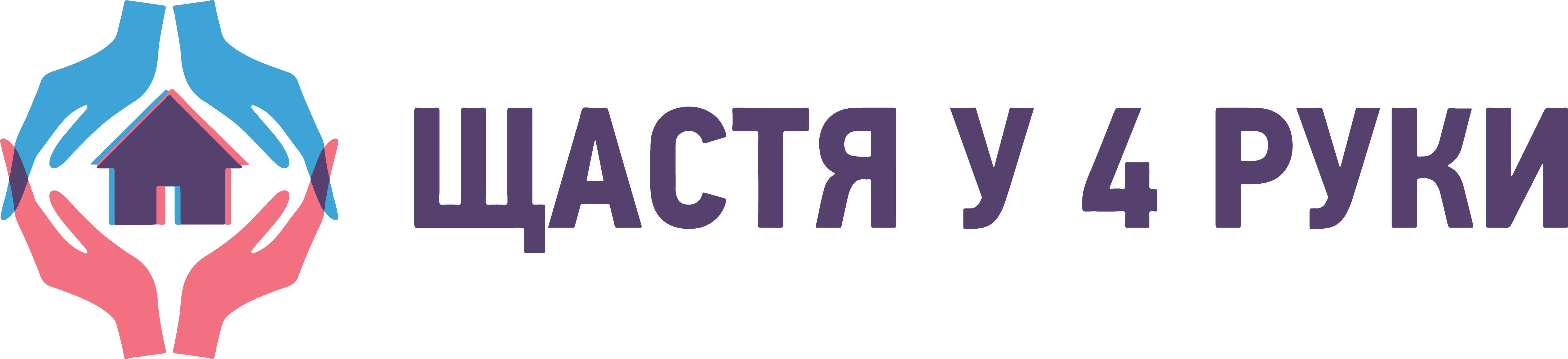 Офіційний логотип проекту